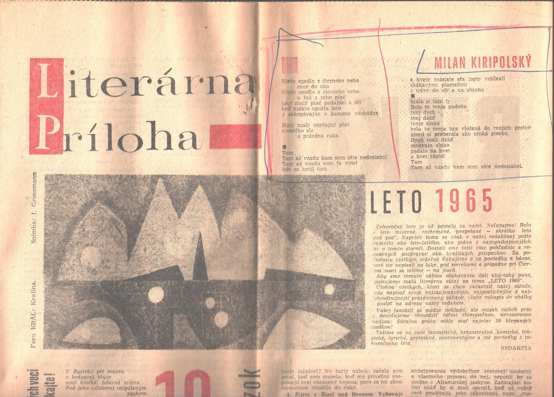 Sken literárnej prílohy denníka? z roku 1965